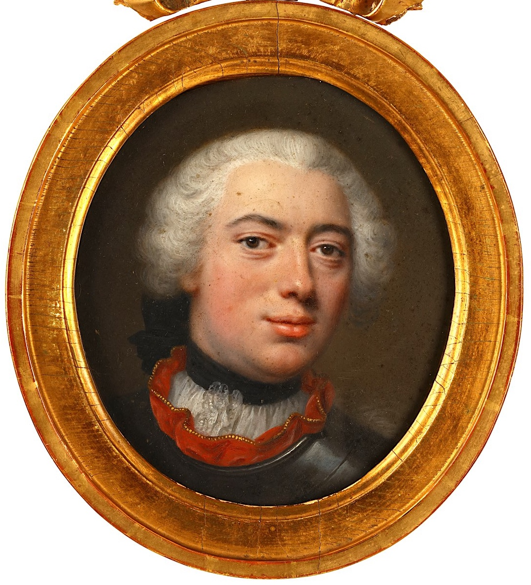 Charles Emil Lewenhaupt den yngre (1721-1796), avporträtterad runt 1750 iklädd harnesk. Målningen är utför av Johan Stålbom (1712-1777)